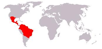 Bewerking afbeelding: Afbeelding_(kaart).JPG